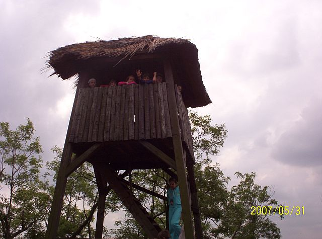 Csákvár